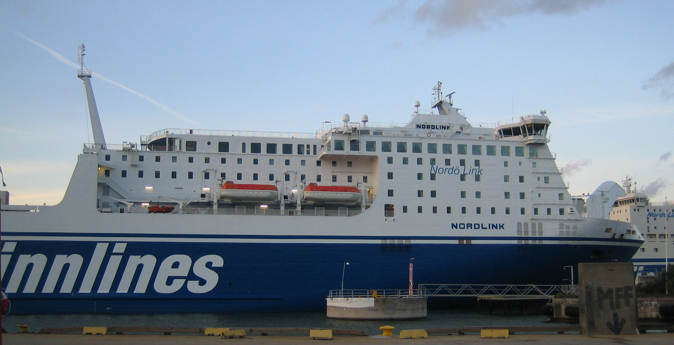 Nordlink of Nordö Link in Malmö harbour